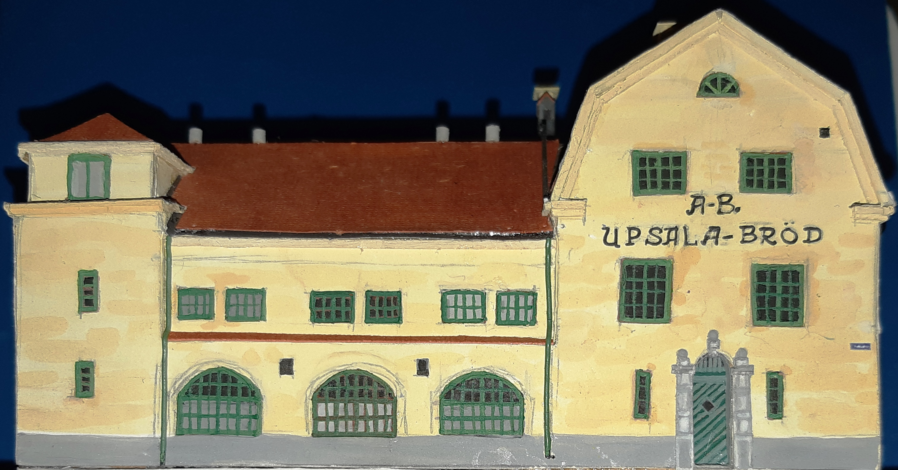 Modellfoto